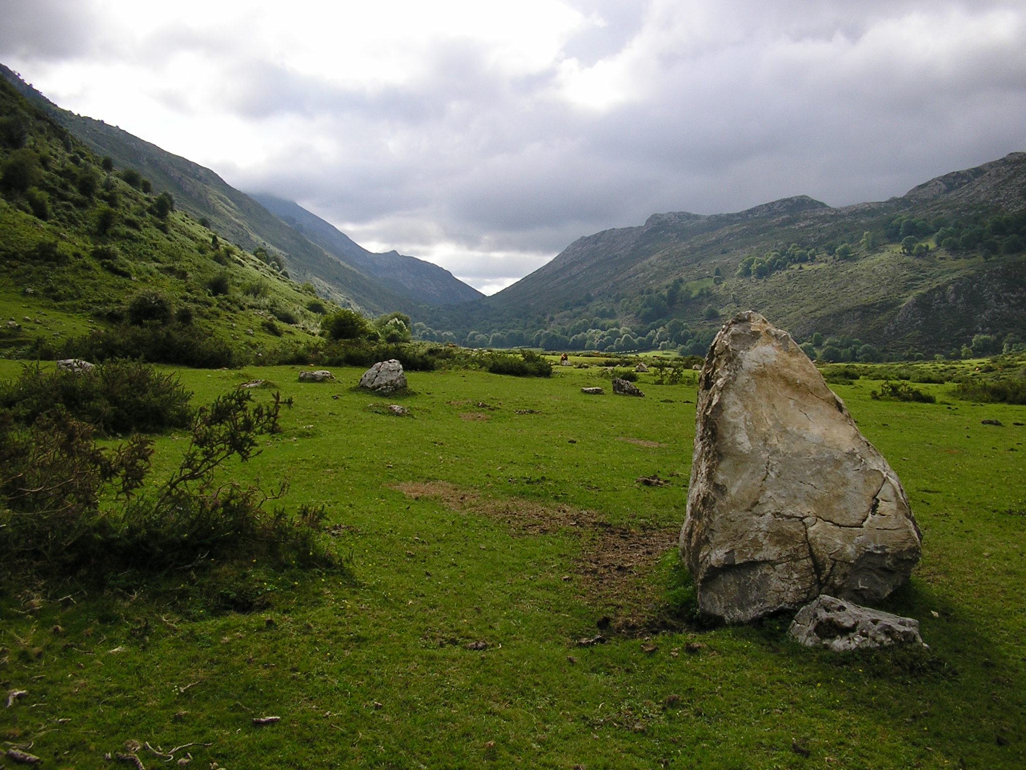 Berglandschaft bei Llanes im Juli 2005